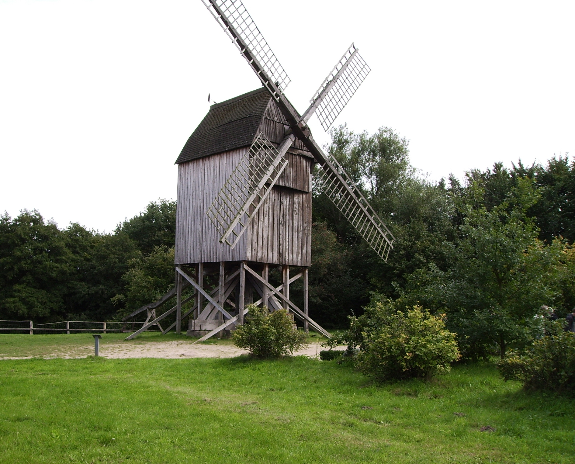 Bockwindmühle im Freilichtmuseum Molfsee bei Kiel. Ursprünglicher Standort war Algermissen.